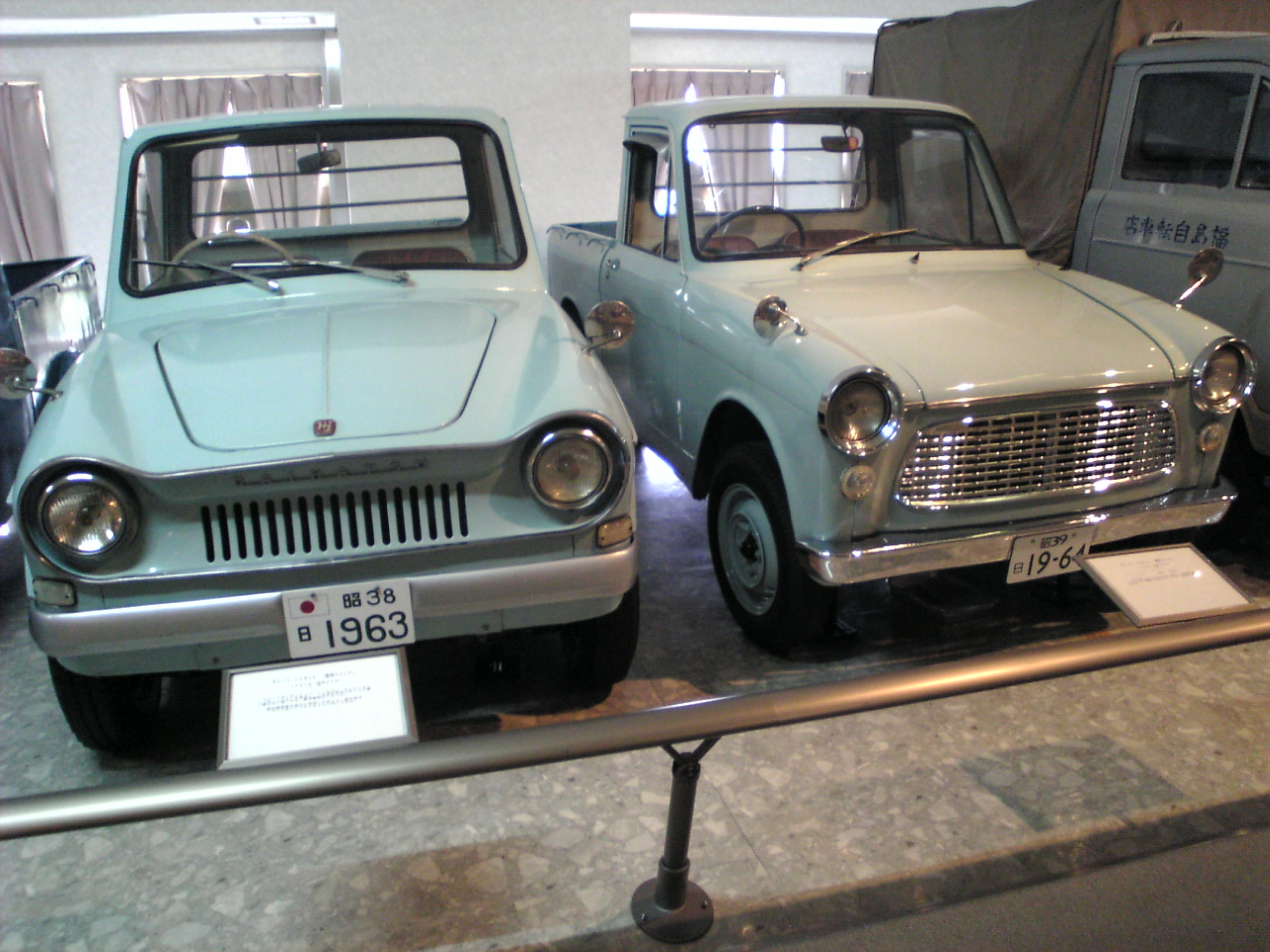 ダイハツ・ハイゼット（初代）